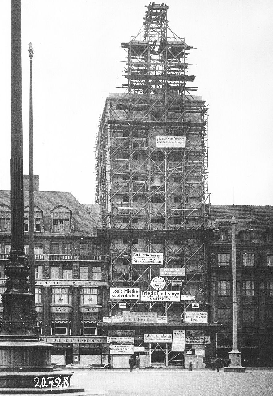 Bau des Bankhauses Kroch, Bild vom 20. Juli 1928.